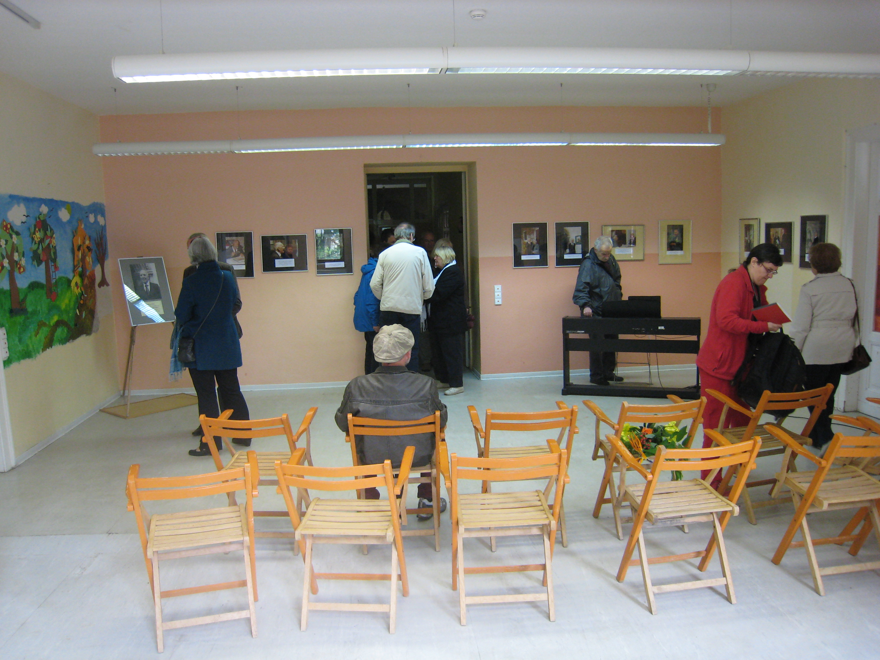 Raum im 1. Stock der Villa Franz, Arnstadt